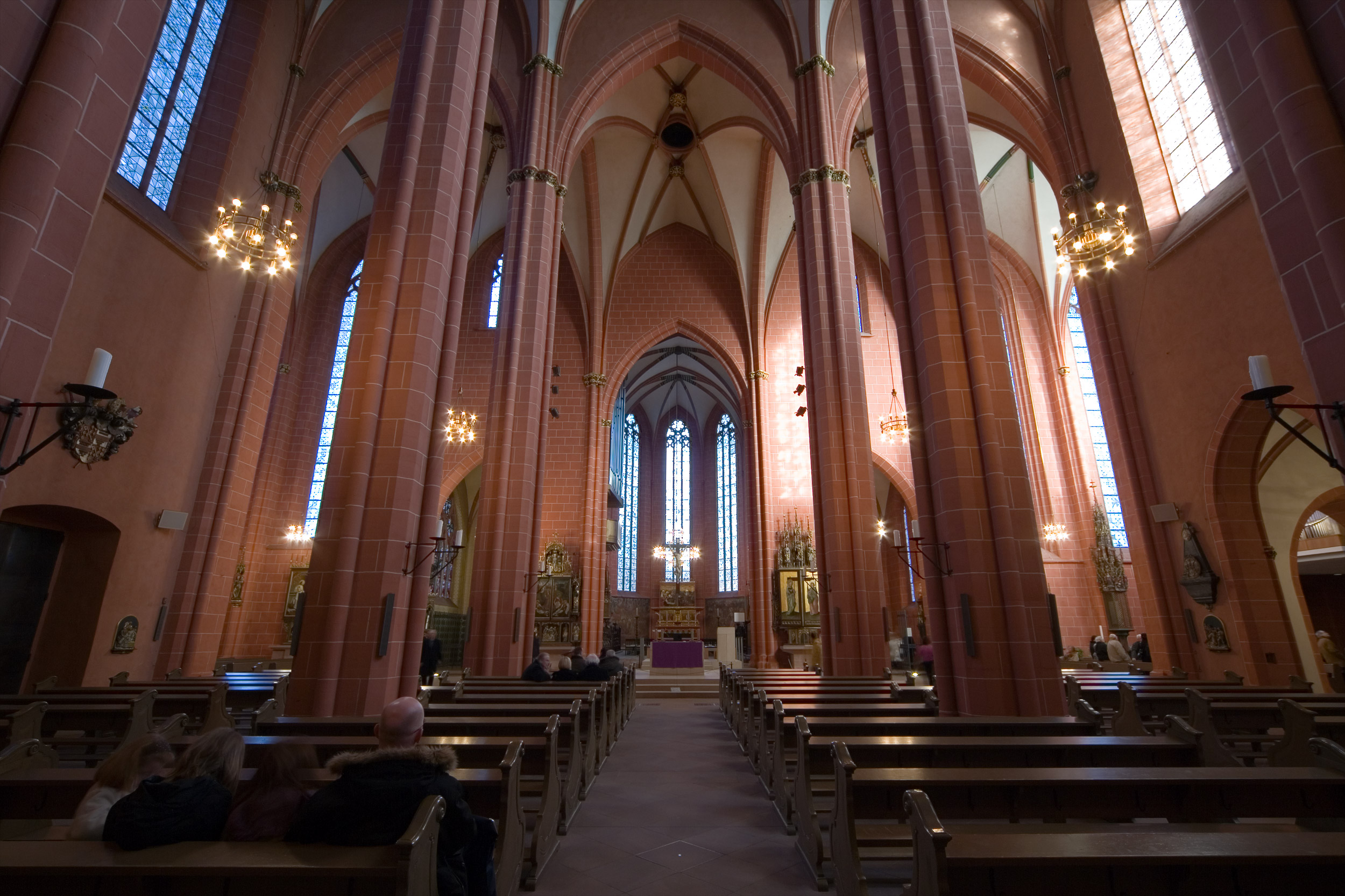 Blick ins Mittelschiff von Westen nach Osten im Kaiserdom St. Bartholomäus in Frankfurt am Main. Selber fotografiert im Februar 2008, Doppellizensierung GFDL & CC-BY-SA 2.5. Reshot version of the original Image:Mk Frankfurt Dom Mittelschiff.jpg uploaded by User:Magadan.